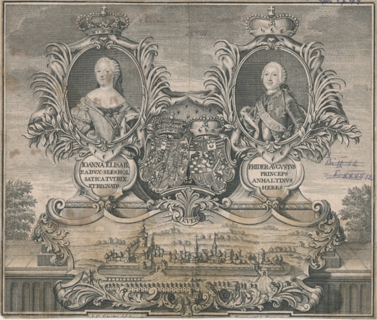 Titelkupfer des Jeverschen Gesangbuches von 1751 mit Johanna Elisabeth, geborene Fürstin von Holstein-Gottorp (1712-1760) und Friedrich August von Anhalt-Zerbst (1734-1793)